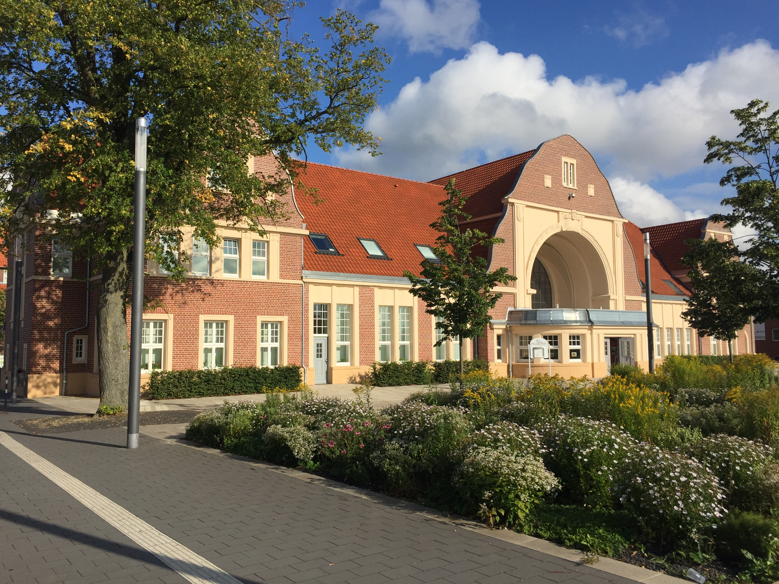 Der Quakenbrücker Bahnhof von der Rückseite aus gesehen.